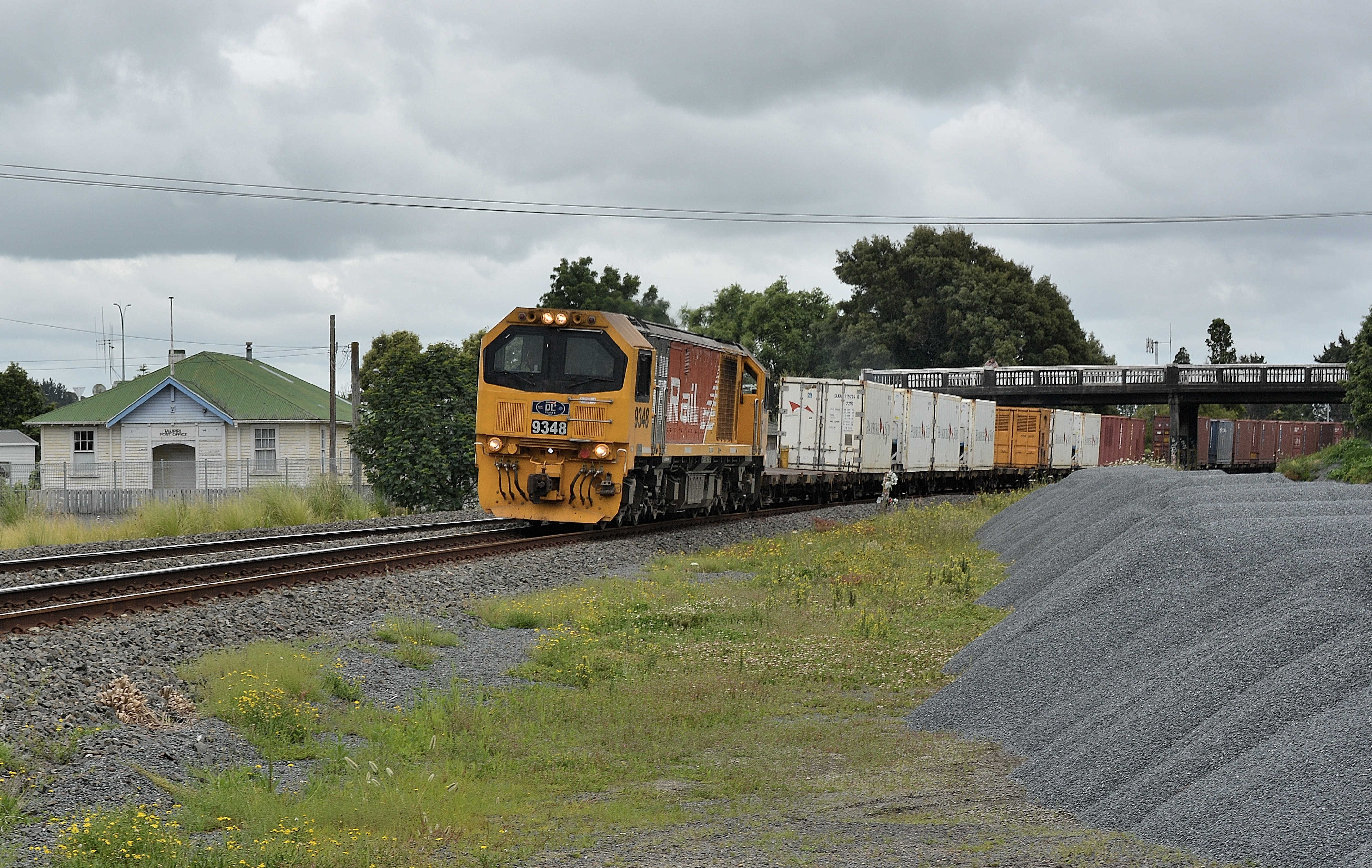 Taupiri,Waikato.New Zealand